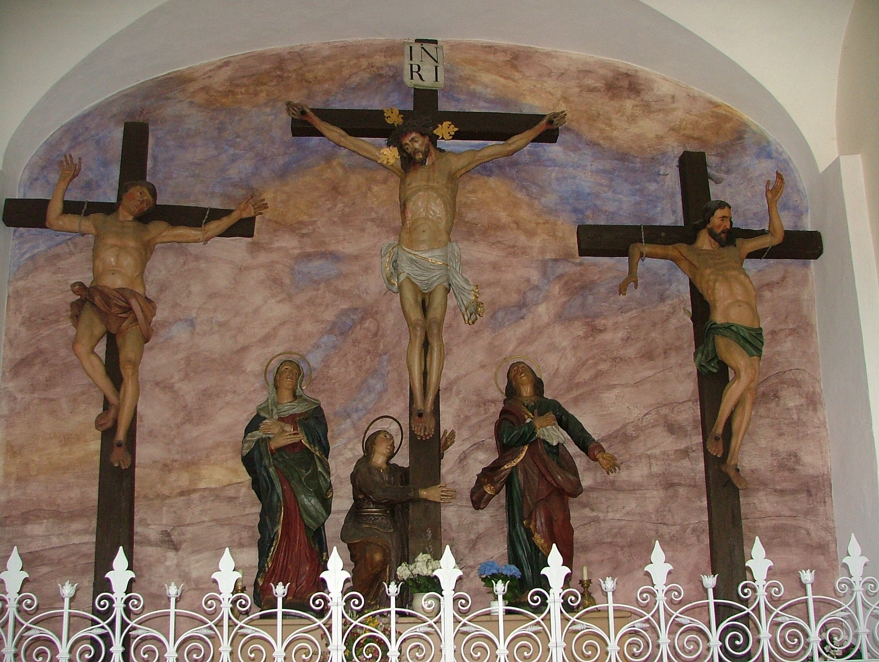 Kalvarienkapelle